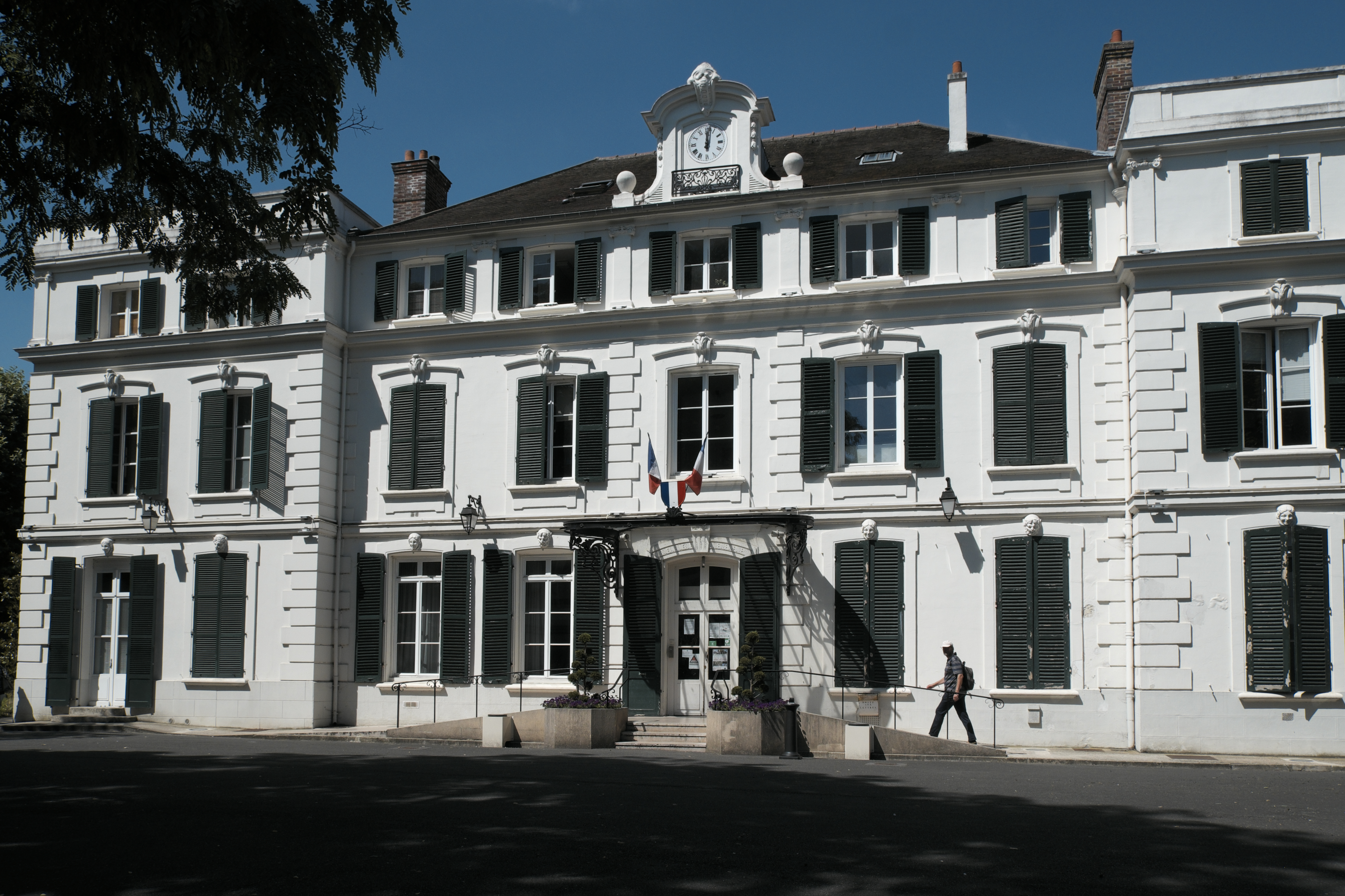 Rathaus (Mairie) in Draveil im Département Essonne (Île-de-France/Frankreich)